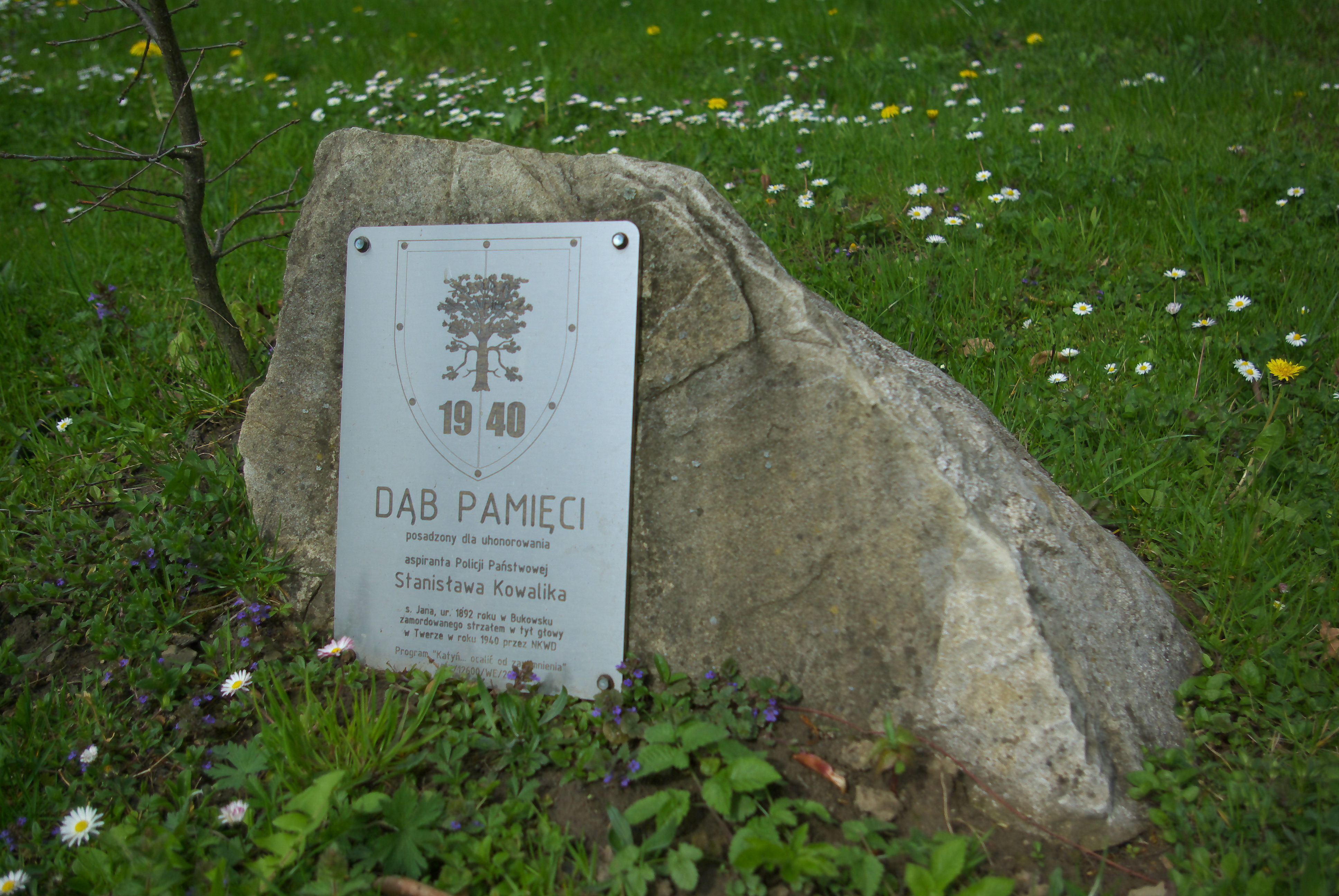 Dąb Pamięci honorujący Stanisława Kowalika w Pisarowcach